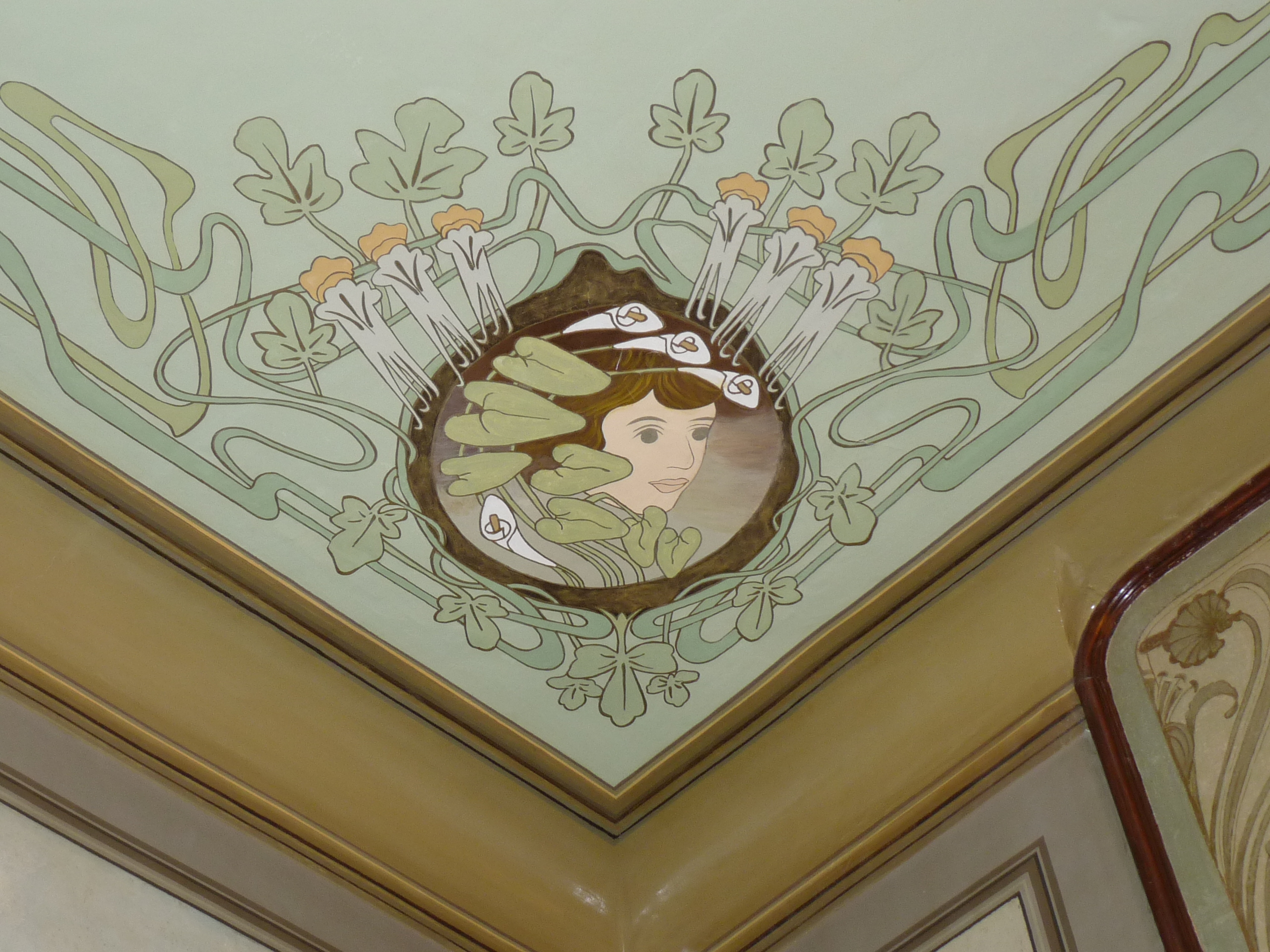 Huesca - Casino de Huesca (1902) - Zaguán - Pintura en techo